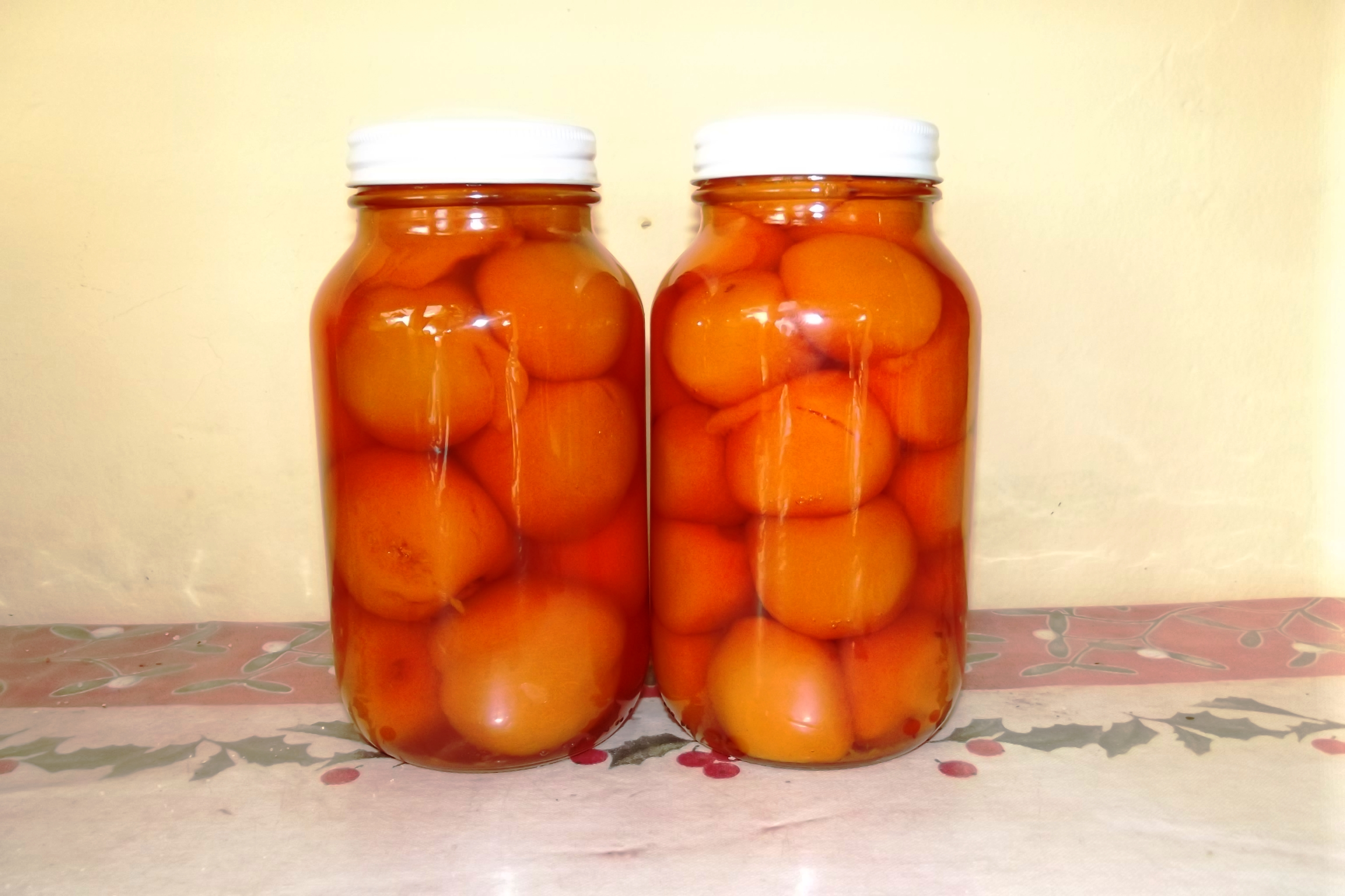 Frutas en almibar